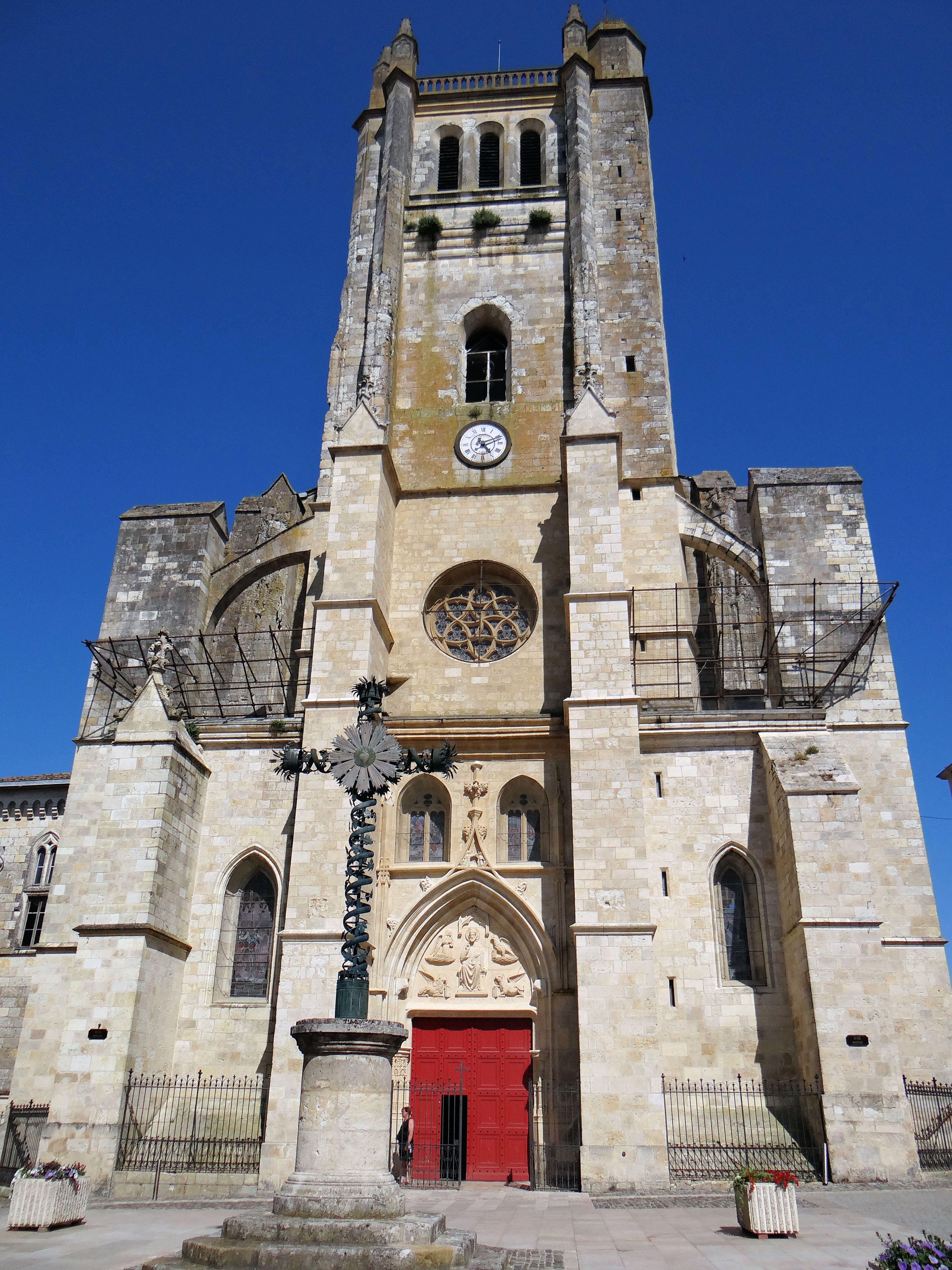 Condom - Cathédrale Saint-Pierre - Façade occidentale